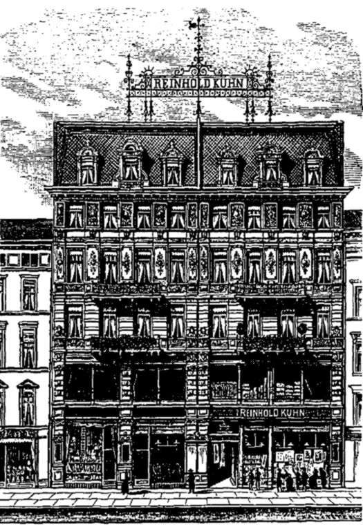 Verlag, Buchhandlung, Papiergeschäft usw.: Geschäftshaus von Reinhold Kühn, in der Leipziger Straße